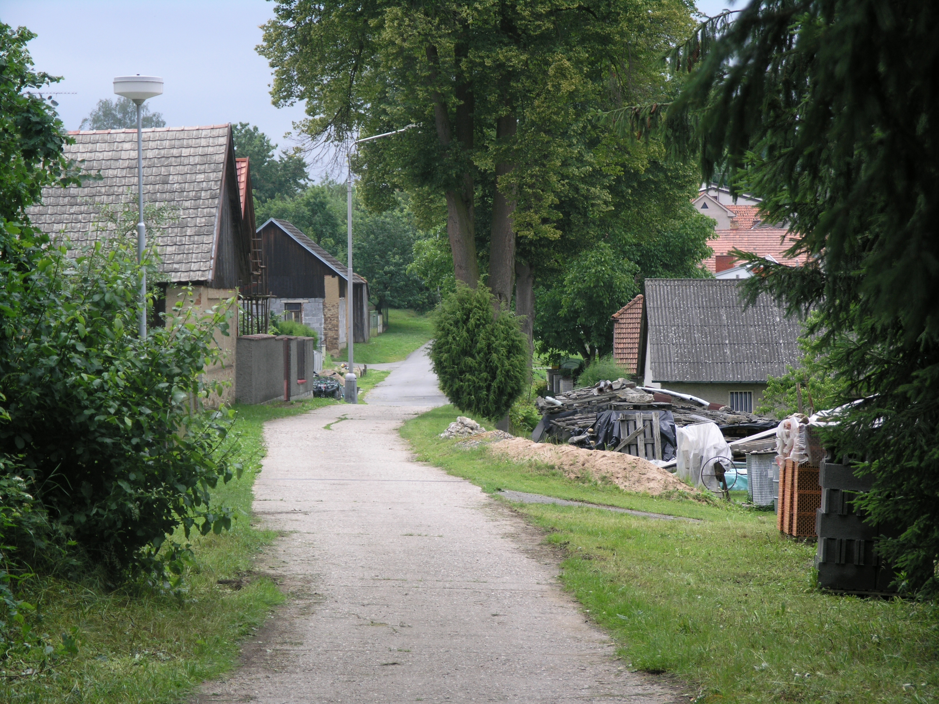 Hulice - východní okraj obce